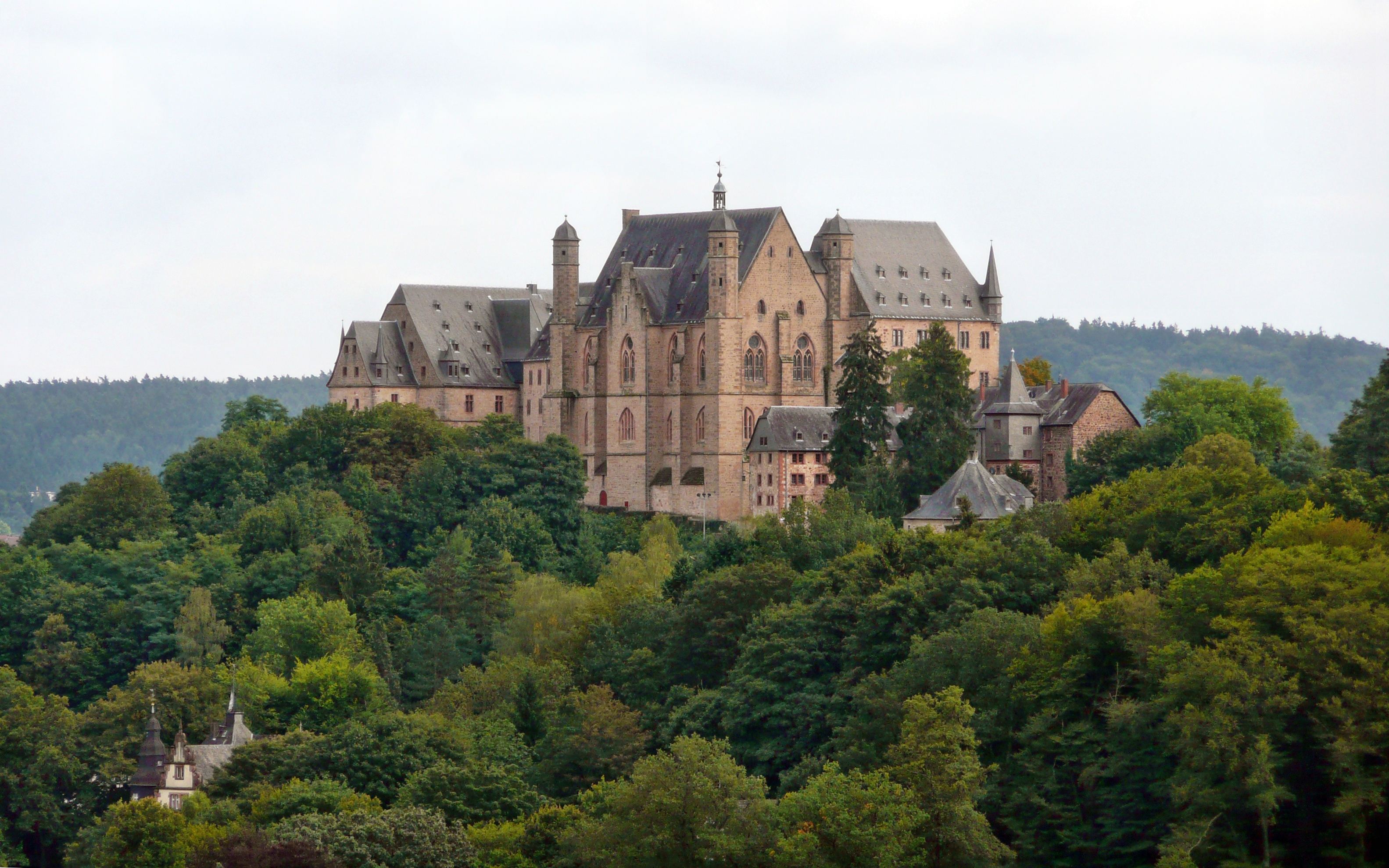 Das Marburger Schloss aus Richtung Nordwest